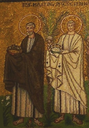 San Martín (izquierda) y San Clemente (derecha) en el mosaico de Sant'Apollinare en Ravenna